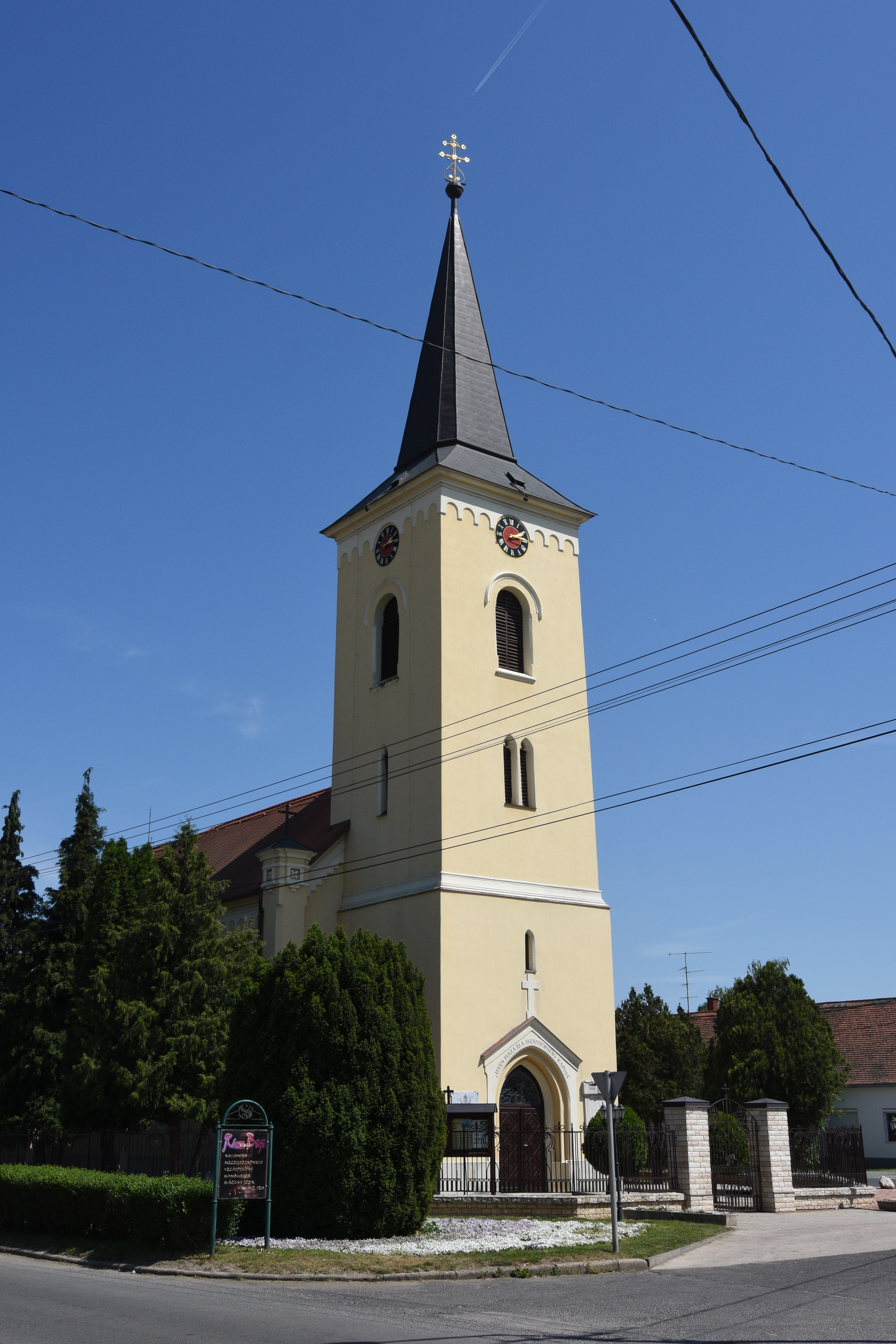 Saint Nicholas Church in Sárvár